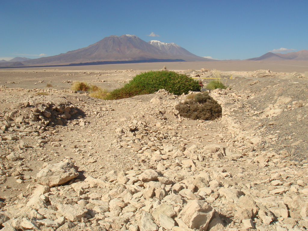 San Pedro and San Pablo volcanoes, Chile.